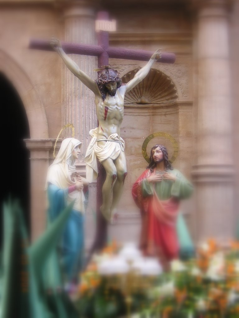 procesion en andorra